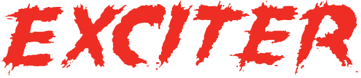 Logo der Band Exciter (Band)